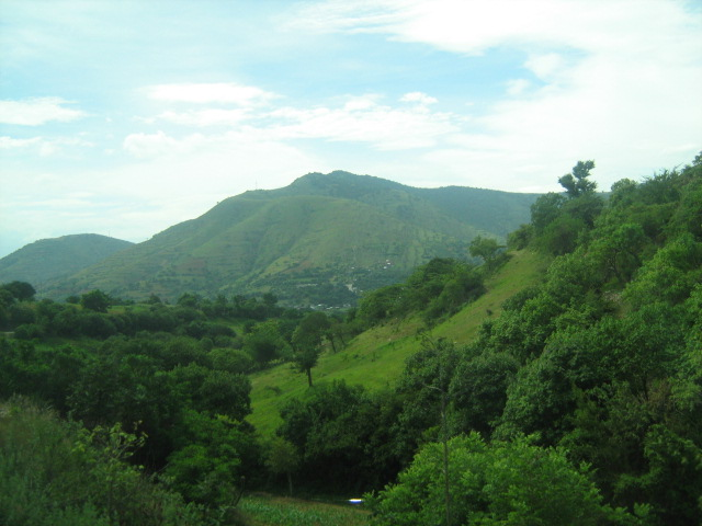 Camino a Santa Catarina Juquila, Oaxaca.